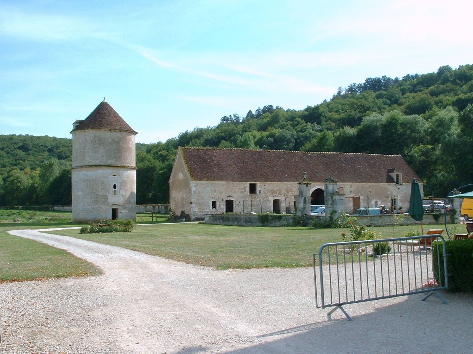 Ancienne abbaye cistercienne de Reigny (Vermenton, Yonne)